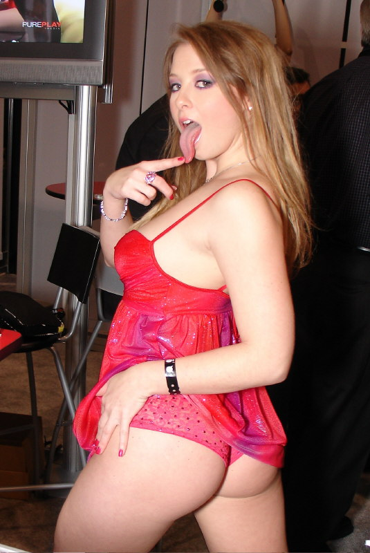 Sunny Lane